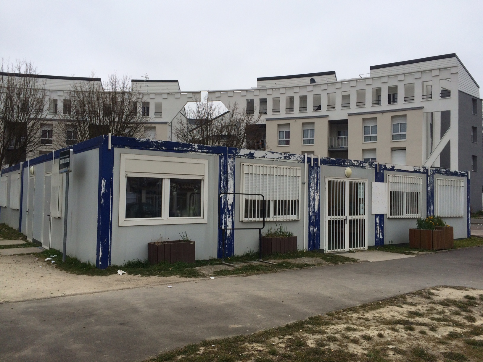 La Maison de quartier Edmond Michelet en mars 2016